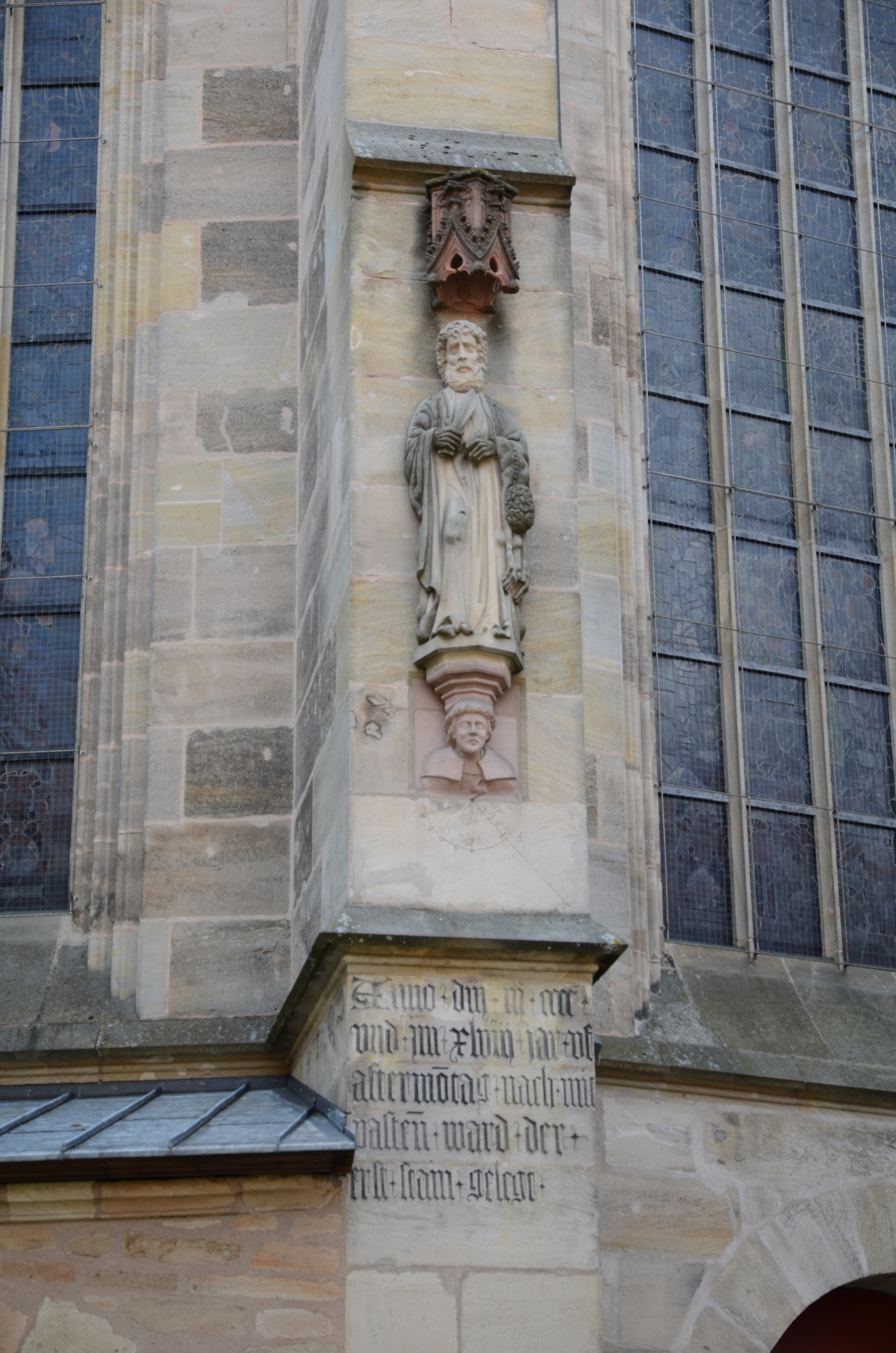 Dinkelsbühl Münster St. Georg, Skulptur am Altrathausplatz